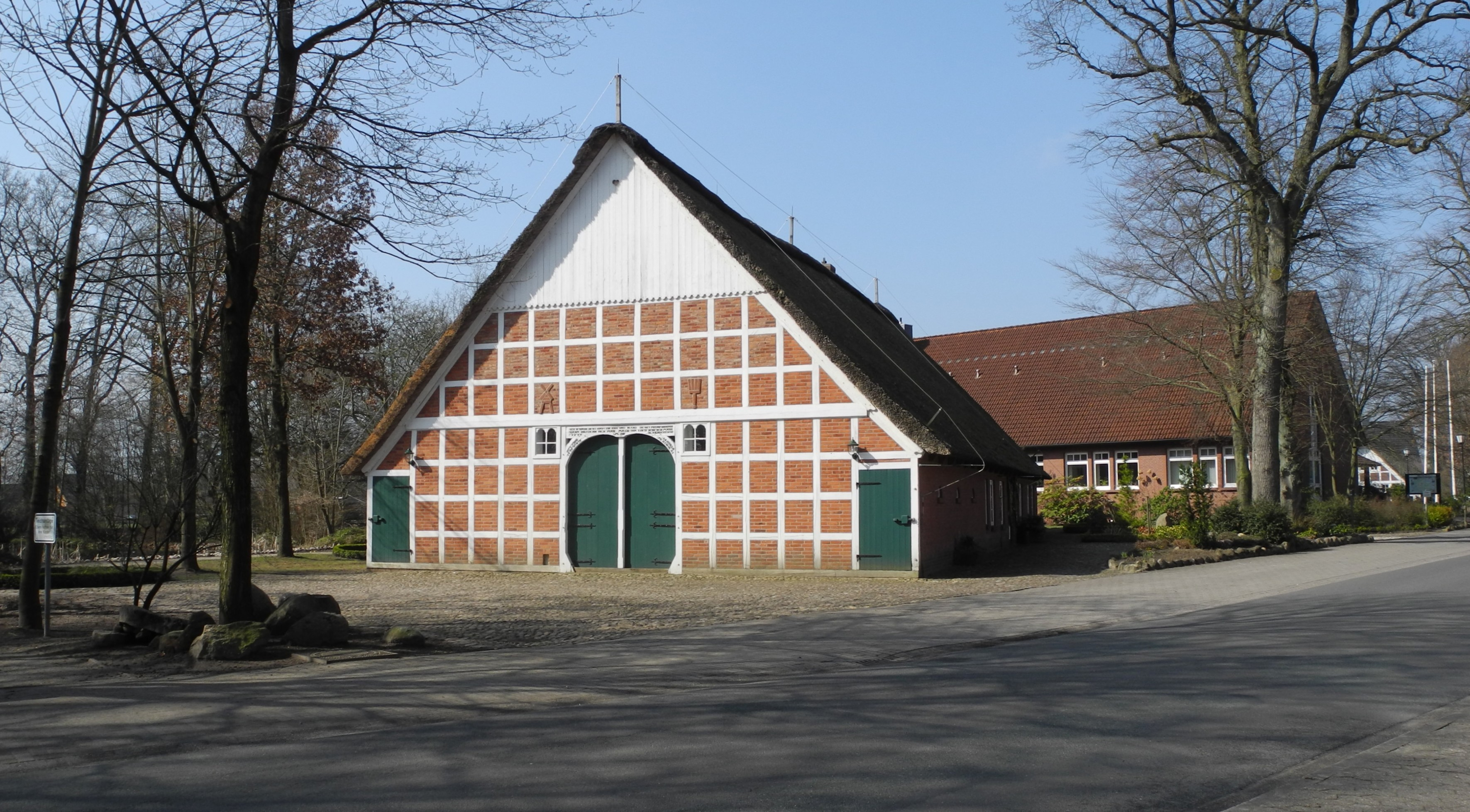 Oldendorf (landkreis Stade) - Fachwerk Bauernhof